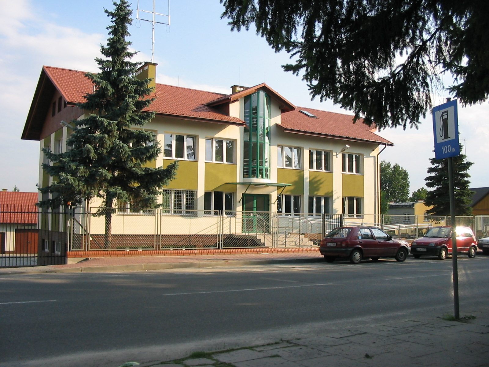 Siedziba Straży Granicznej w Lubaczowie